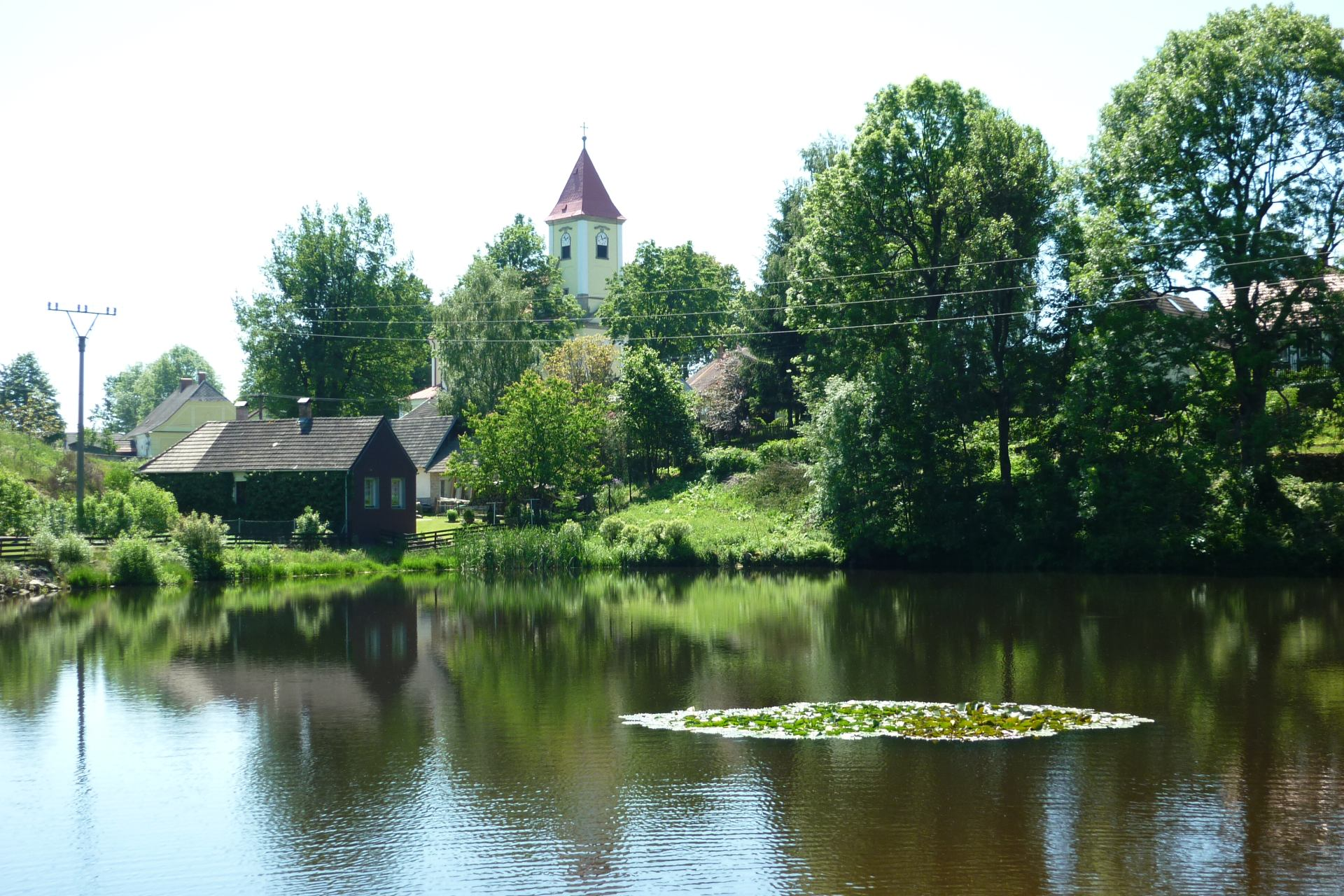 Matějovec - rybníček s lekníny